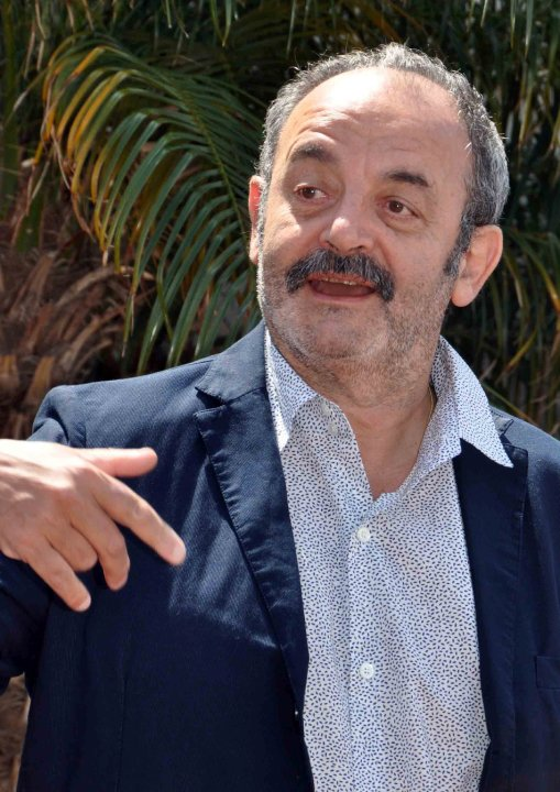 Louis Chédid au festival de Cannes